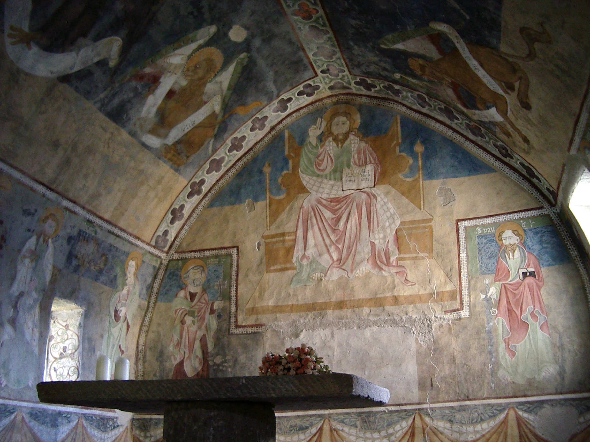 L'église Saint Peyre de Stroppo est située dans la province de Coni au Piémont : fresque : Christ trônant avec les saints Pierre et Paul